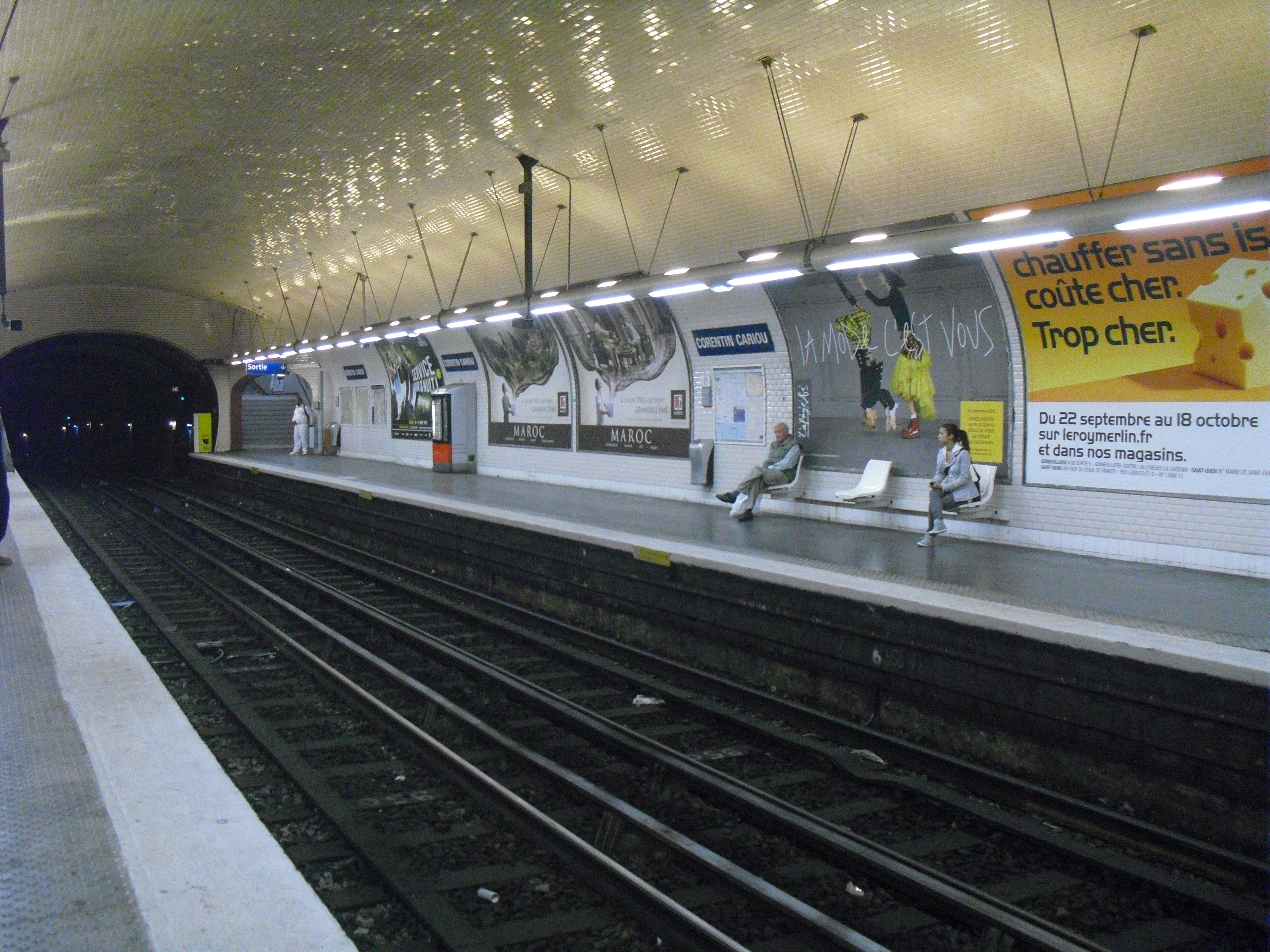 La station de métro Corentin Cariou, vue depuis le quai direction Ivry/Villejuif